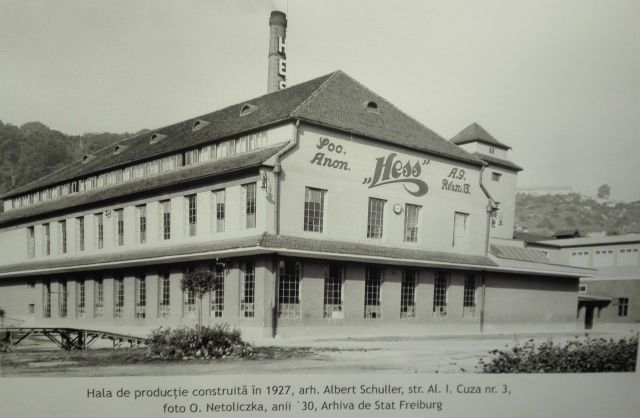 Hess csokoládégyár, Brassó